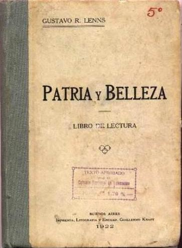 Couverture de Patria y Belleza, livre de lecture composé par Gustavo Lenns pour l'enseignement primaire.